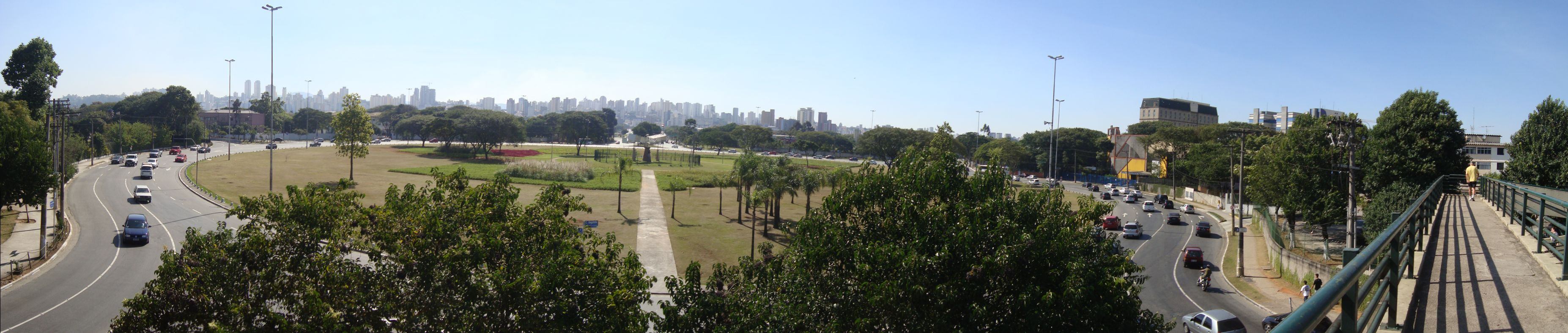 Panorama da Praça Campo de Bagatelle, distrito de Santana Zona Norte paulistana